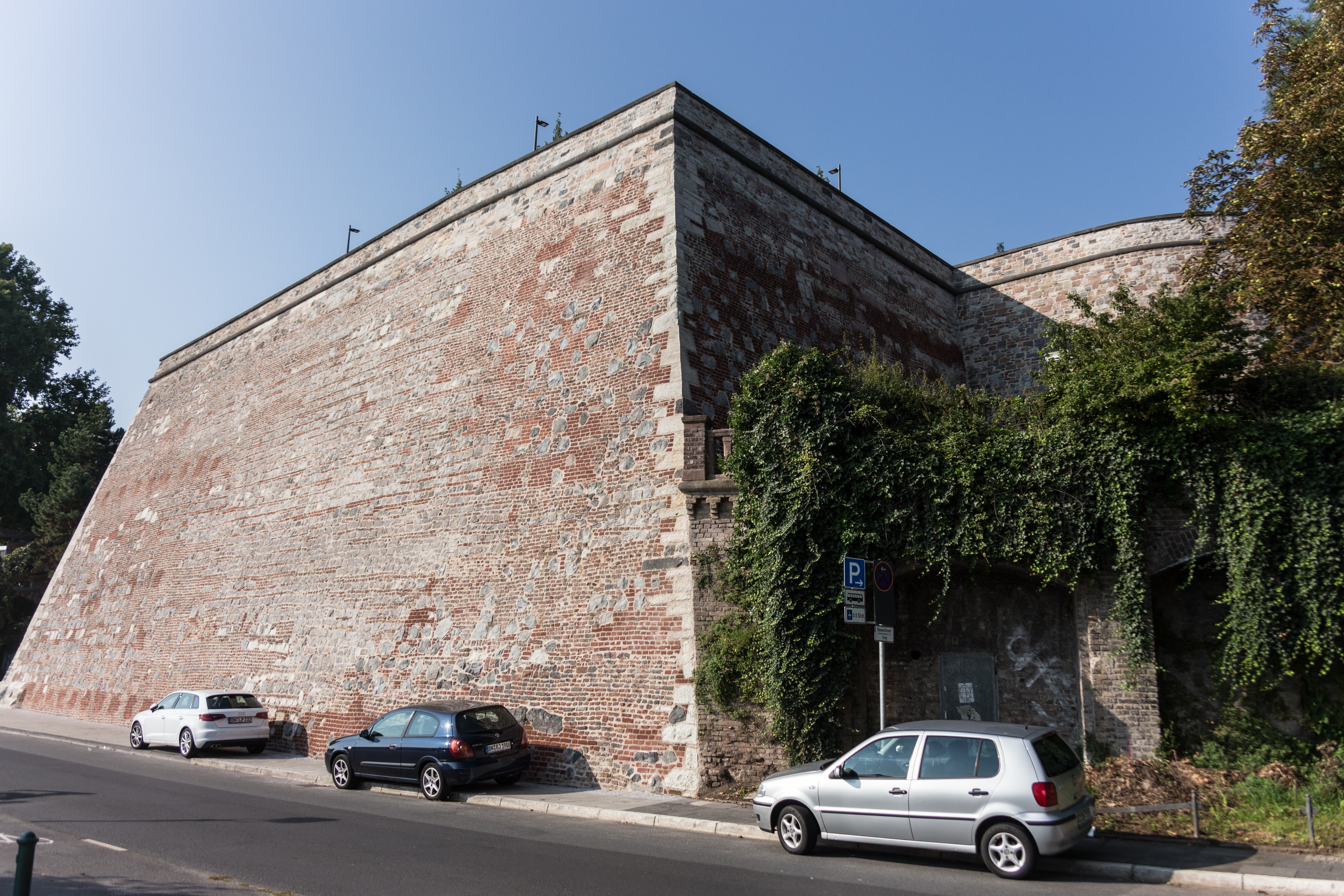 Alter Zoll, Zollmauer, von der Rheinpromenade aus gesehen.